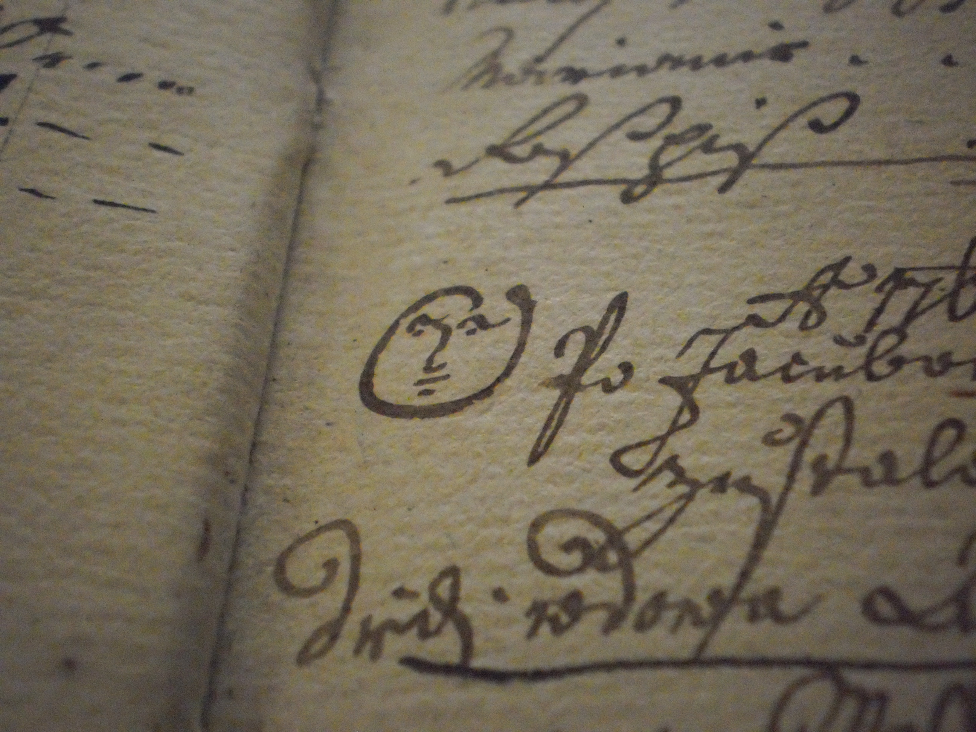 Snímek detailu z gruntovní knihy velkostatku Hluboká nad Vltavou, Lišov - Hůrkym, 1685-1855. Fond SOA Třeboň.